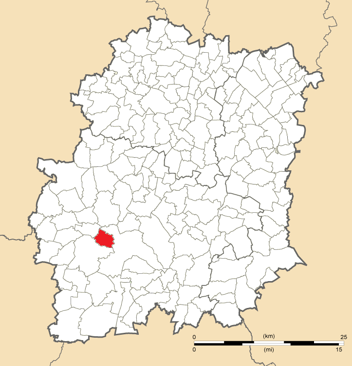 Carte de position de Saint-Hilaire en Essonne (91)